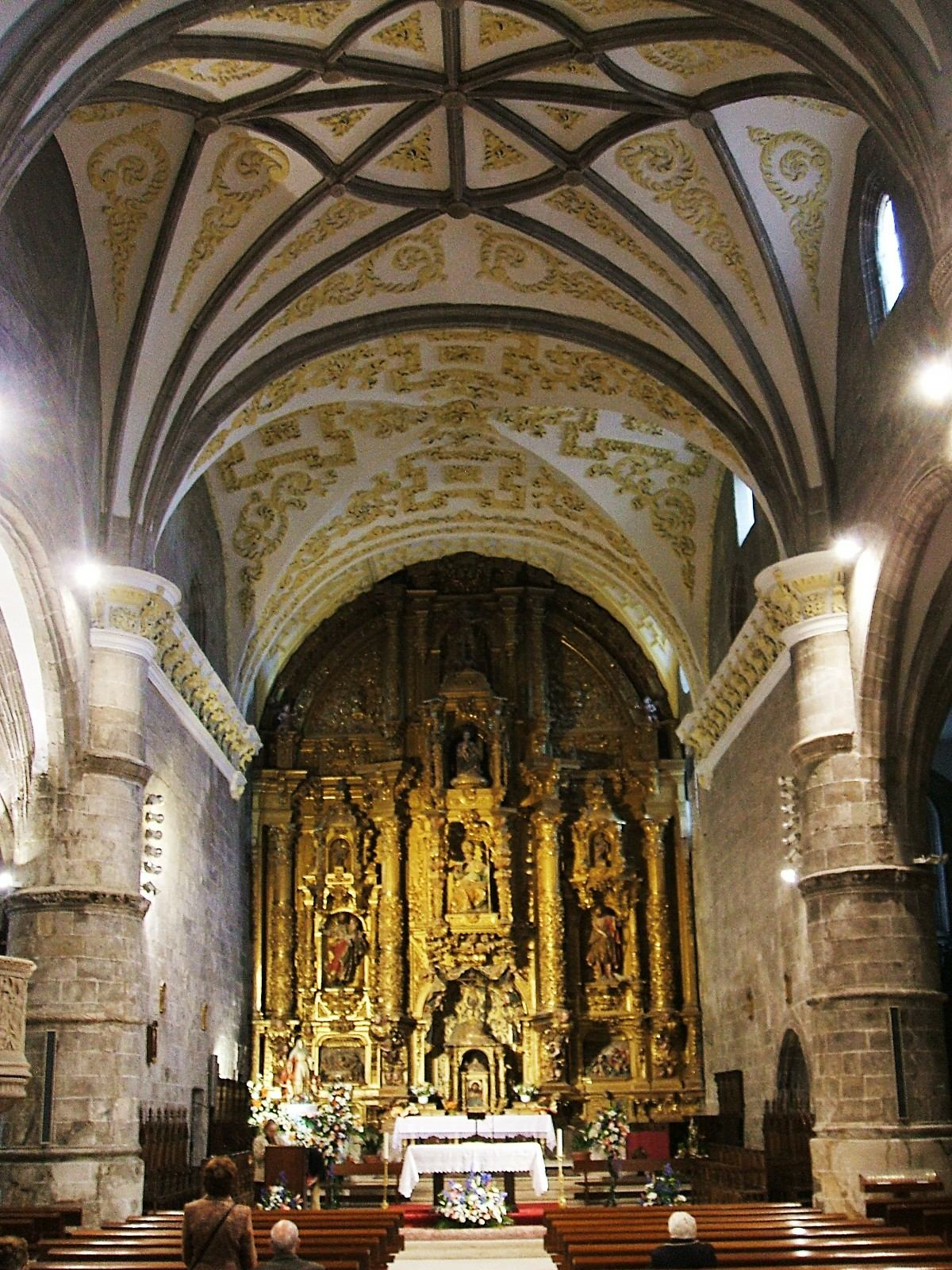 Iglesia de San Martín, Briviesca, Burgos, España